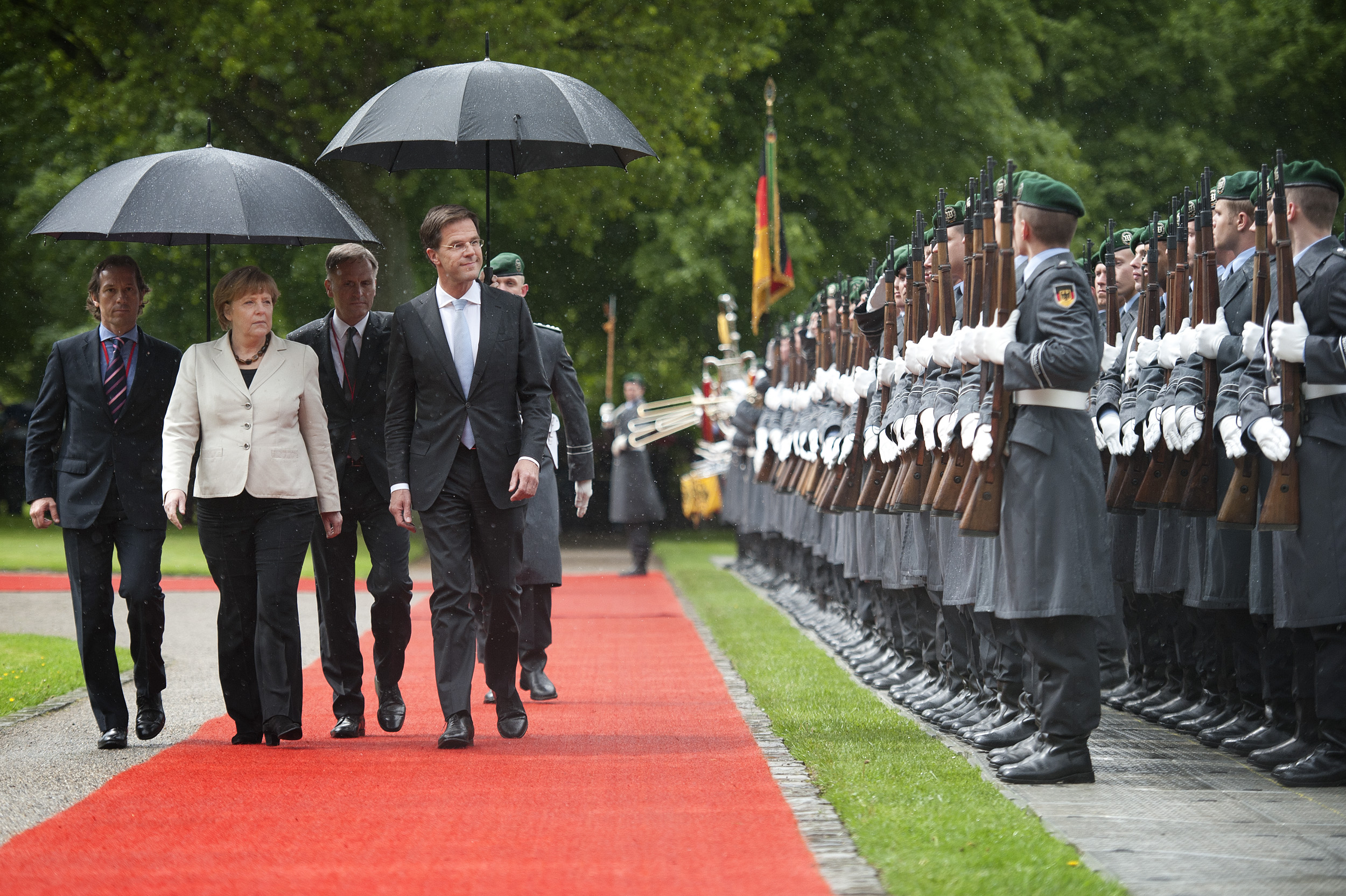 Bondskanselier Merkel en minister-president Rutte inspecteren de erewacht voorafgaand het Nederlands-Duitse regeringsoverleg in Kleef.